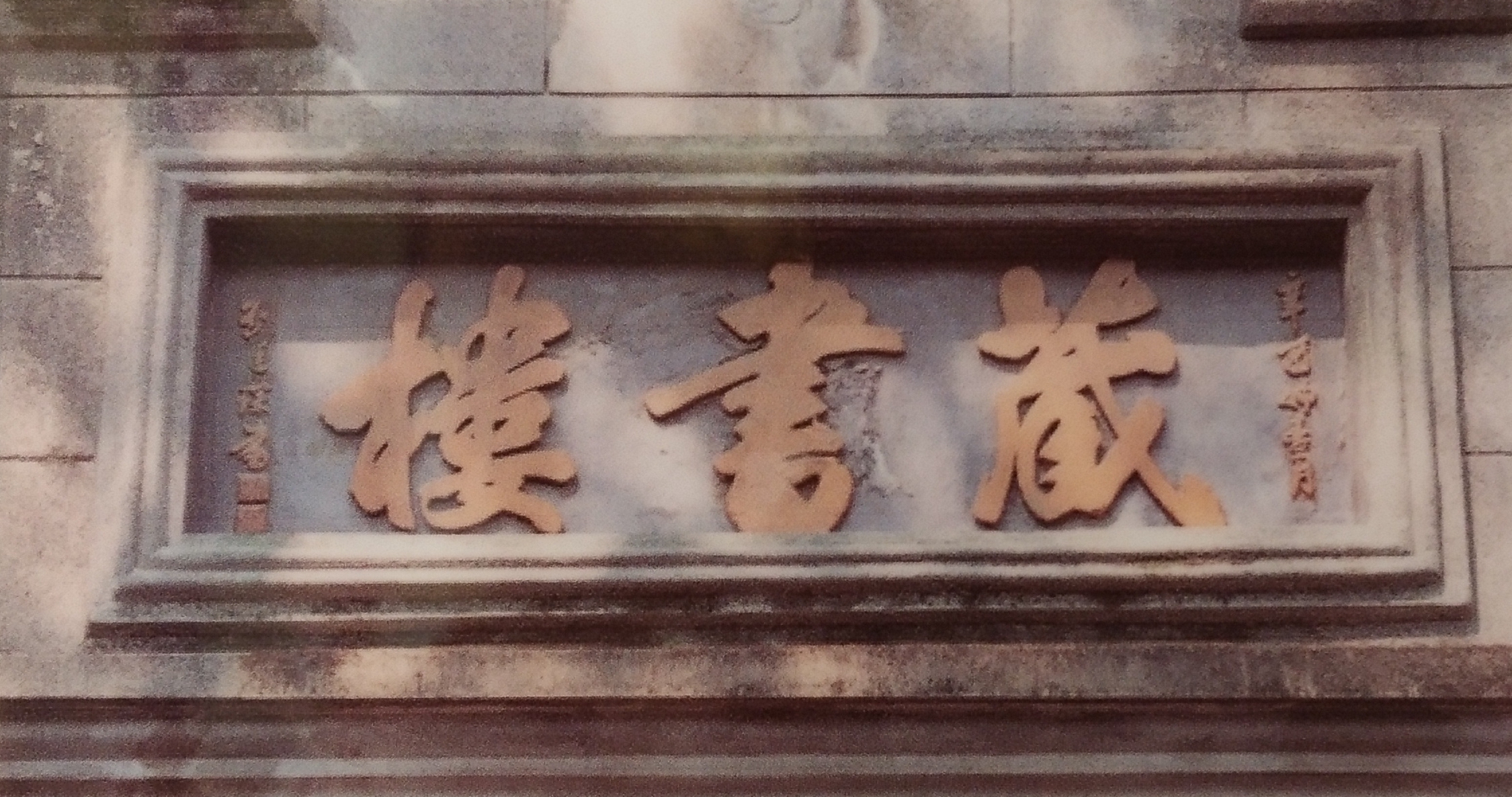 青岛尊孔文社藏书楼匾额